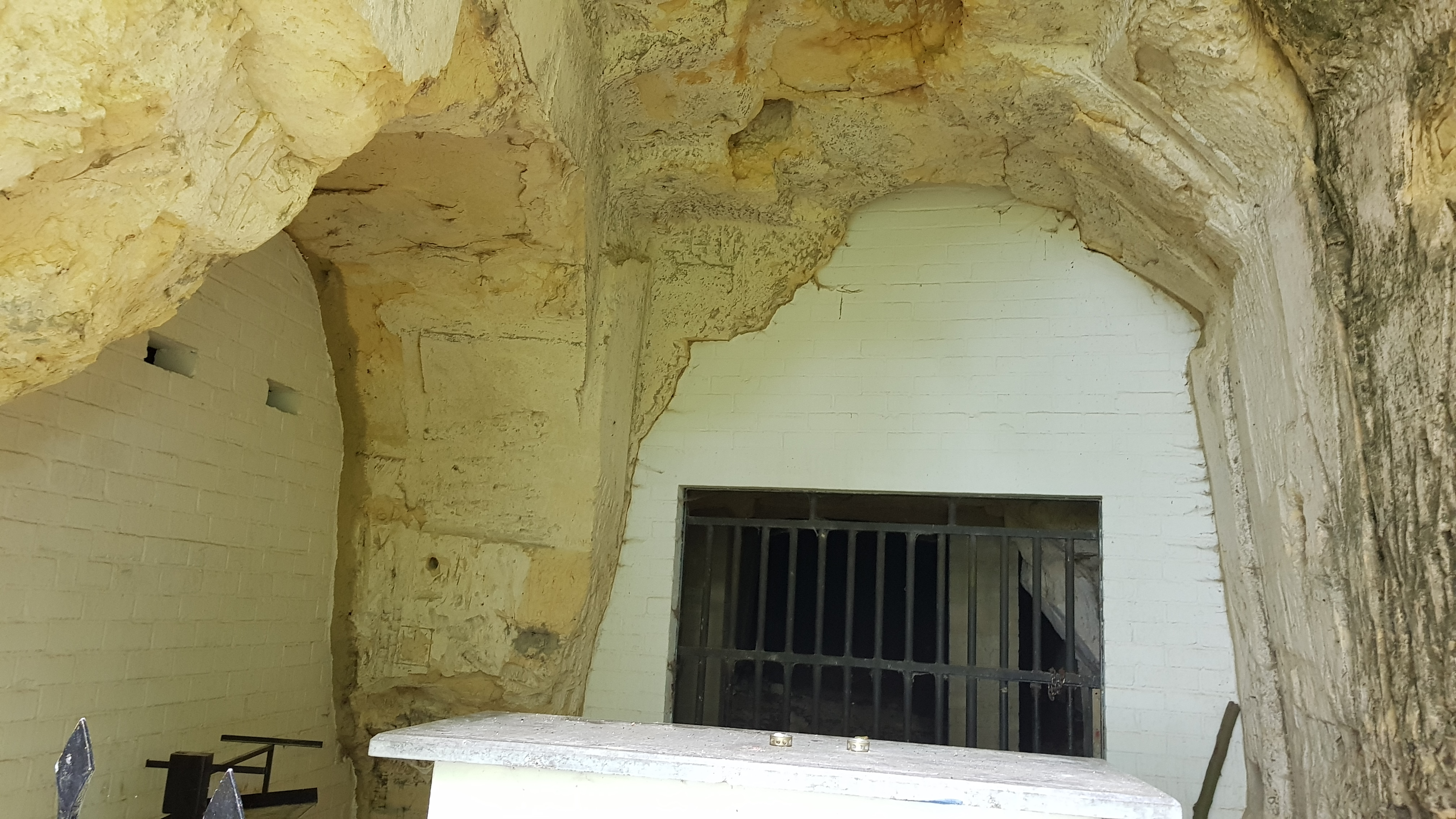 Heerderberggroeve, Cadier en Keer, Nederland